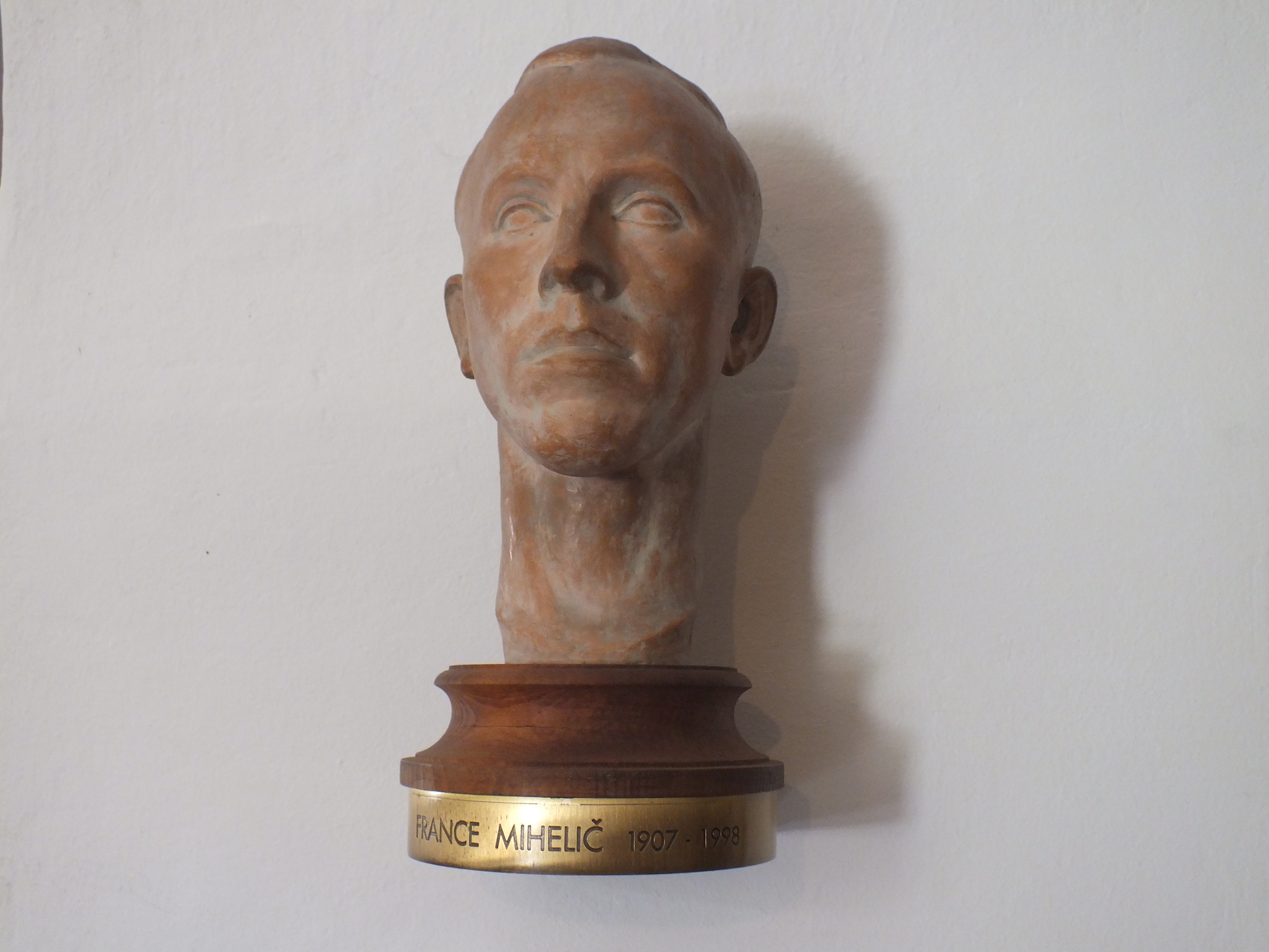 Ptuj, SLO; Kunstgalerie Mihelic